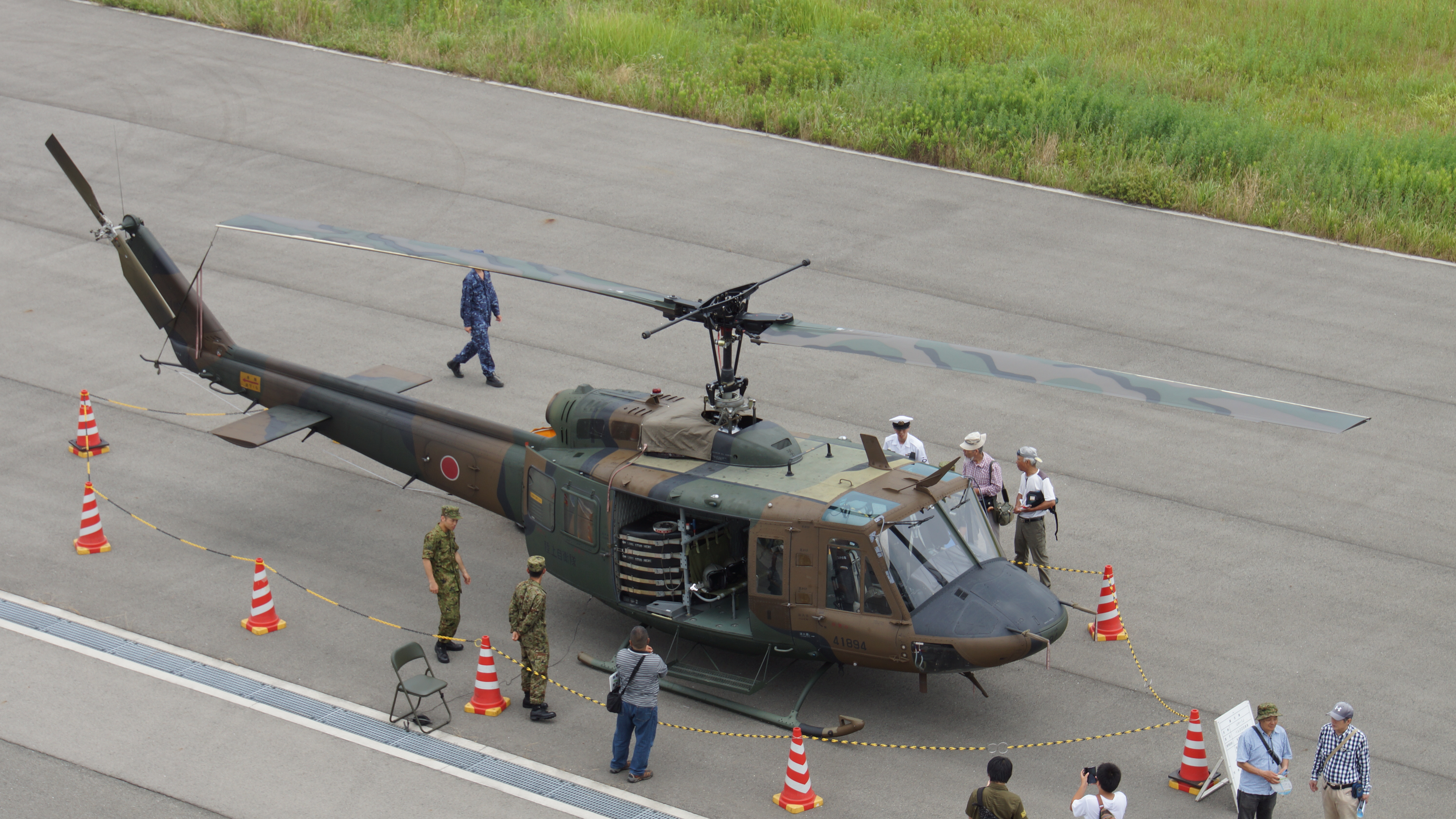 陸上自衛隊 UH-1J多用途ヘリコプター（41894号機） 右上前面。2017年7月9日 尼崎港にて。